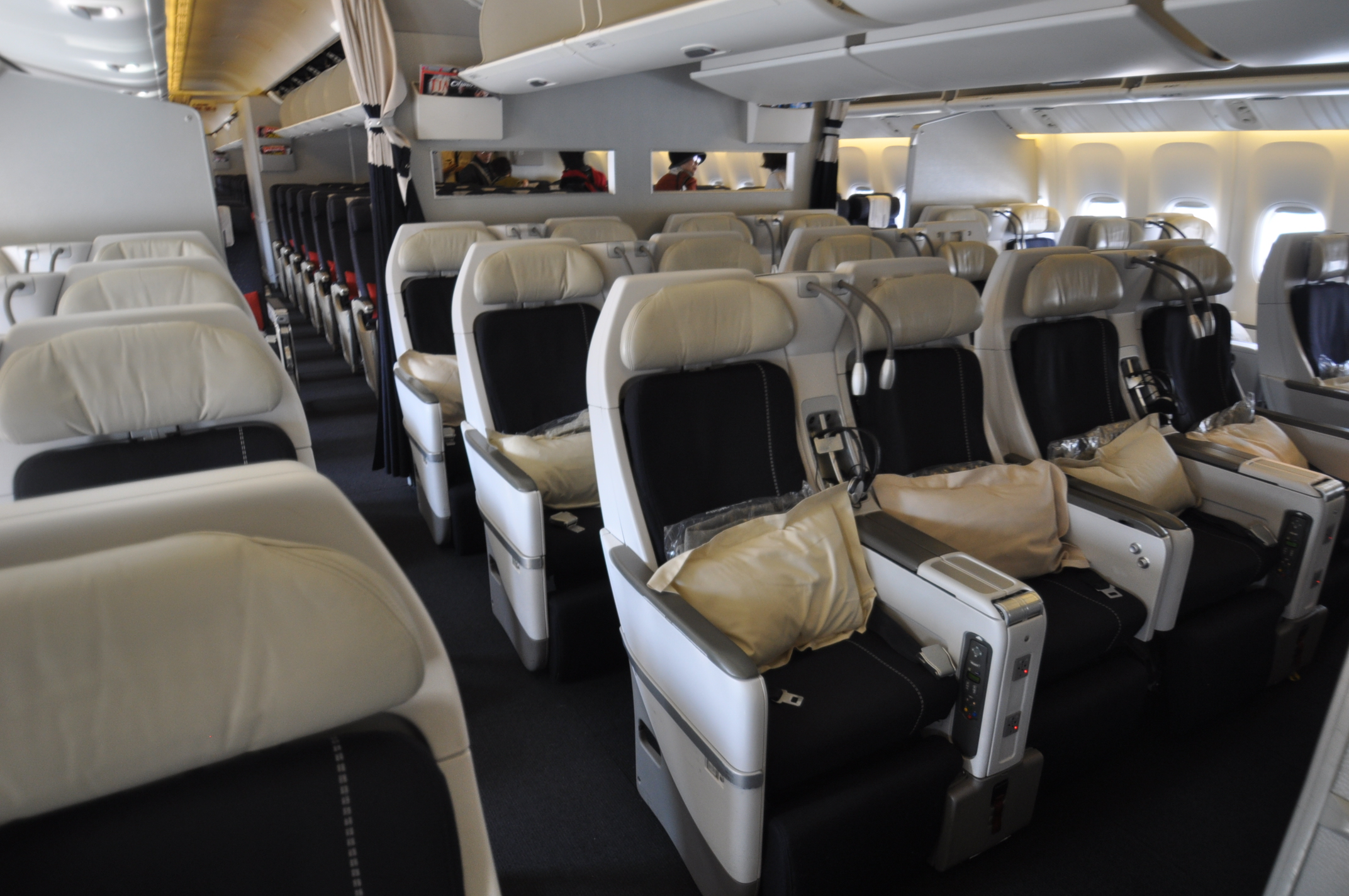 エールフランス航空プレミアムエコノミークラス（Ｂ７７７－３００ＥＲ）